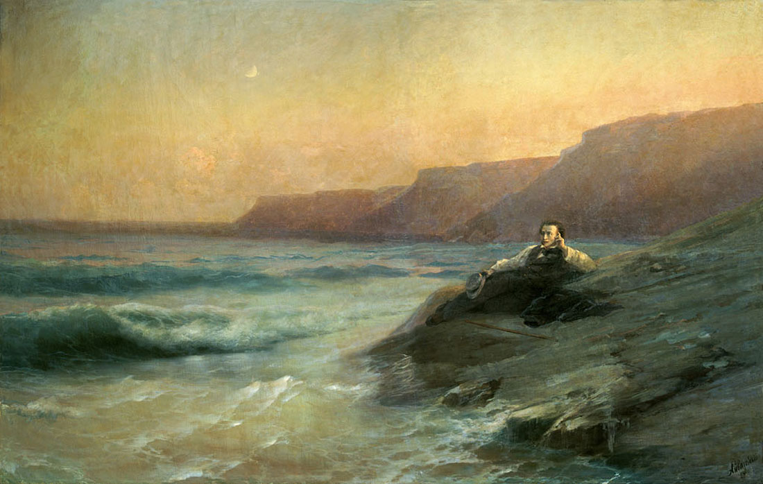 И. К. Айвазовский. «А. С. Пушкин на берегу Чёрного моря». Масло. 1887. 212 × 314 см. Художественный музей им. В. В. Верещагина, Николаев, Николаевская область, Украина.